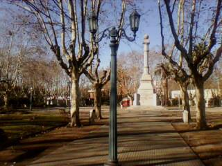 Monumento a Colón (Columna del cuarto centenario). Ubicada en el departamento de Durazno